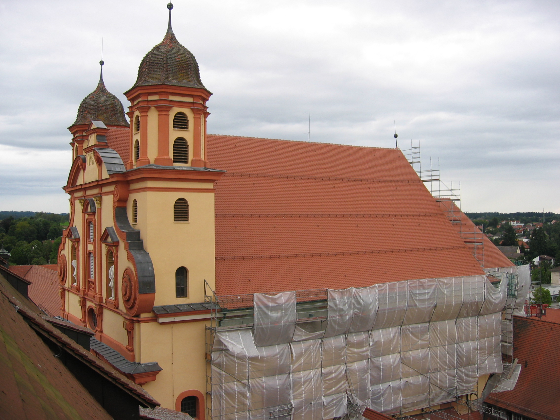 Ev. Stadtkirche (ehem. Jesuitenkirche) vom Dach der Basilika St. Vitus, Ellwangen (Jagst)